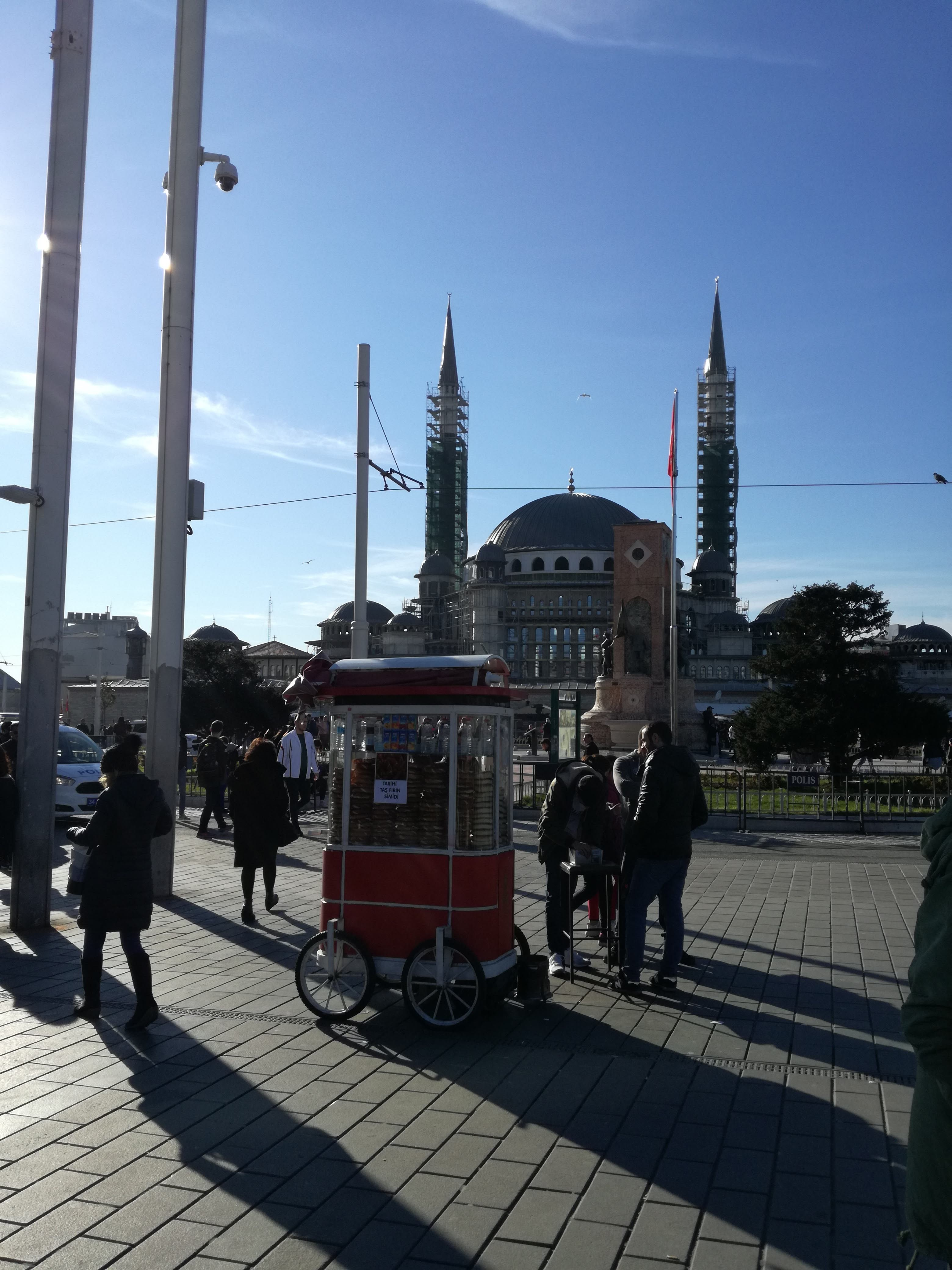 Taksim Meydanı Cami